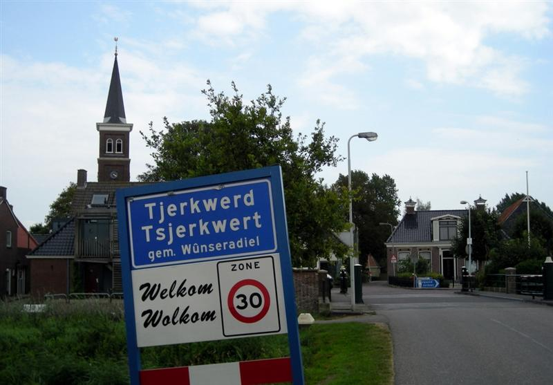 Tjerkwerd